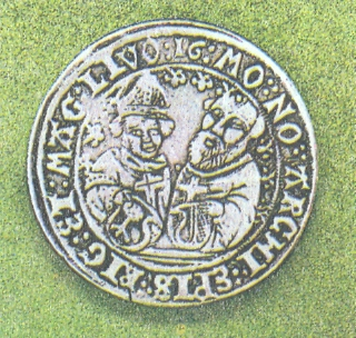 Mārka 1516.g. Averss